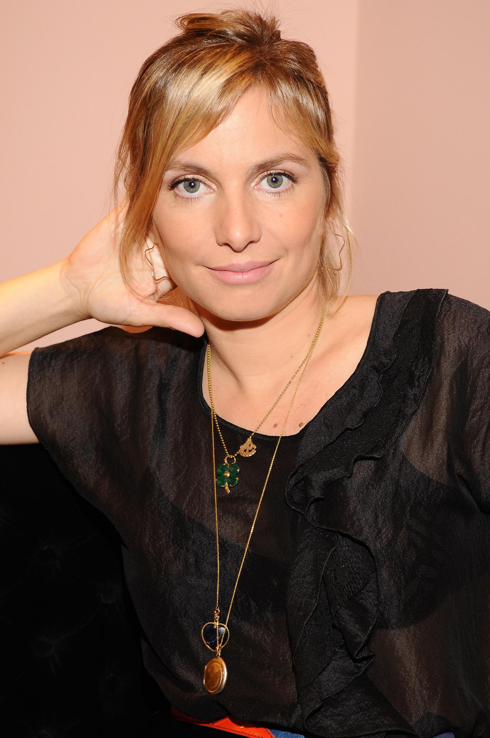 moda